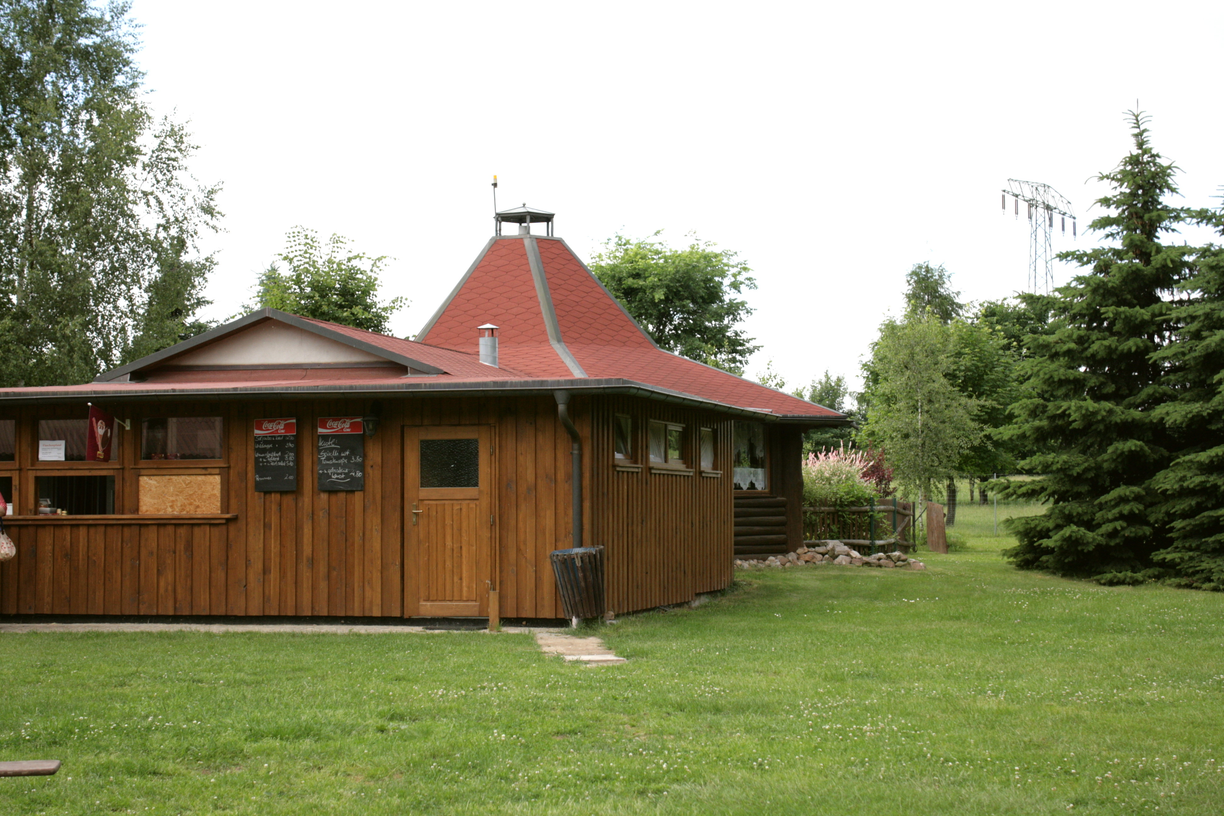 Freizeit- und Campingpark Thräna, Buchholzer Straße 15 in Hohendubrau-Thräna